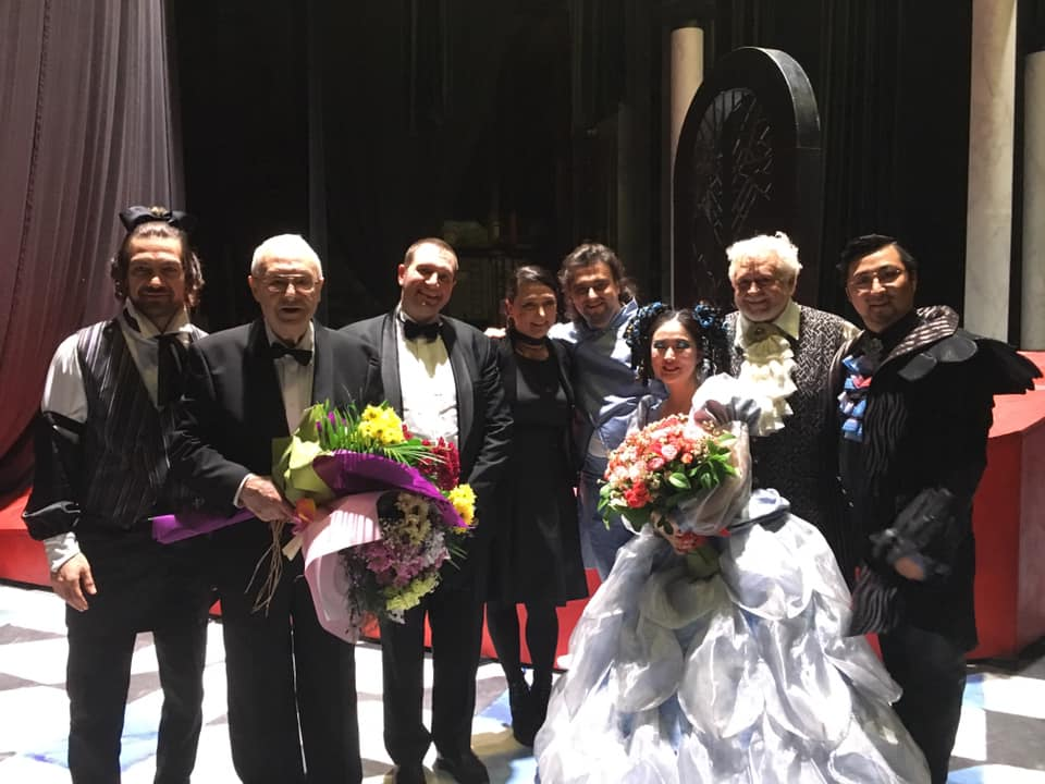 След премиерата.